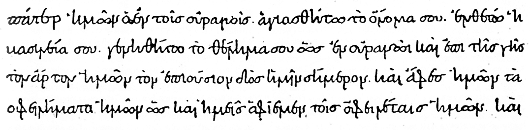 Vater unser, Griechische Minuskel, 10. Jahrhundert